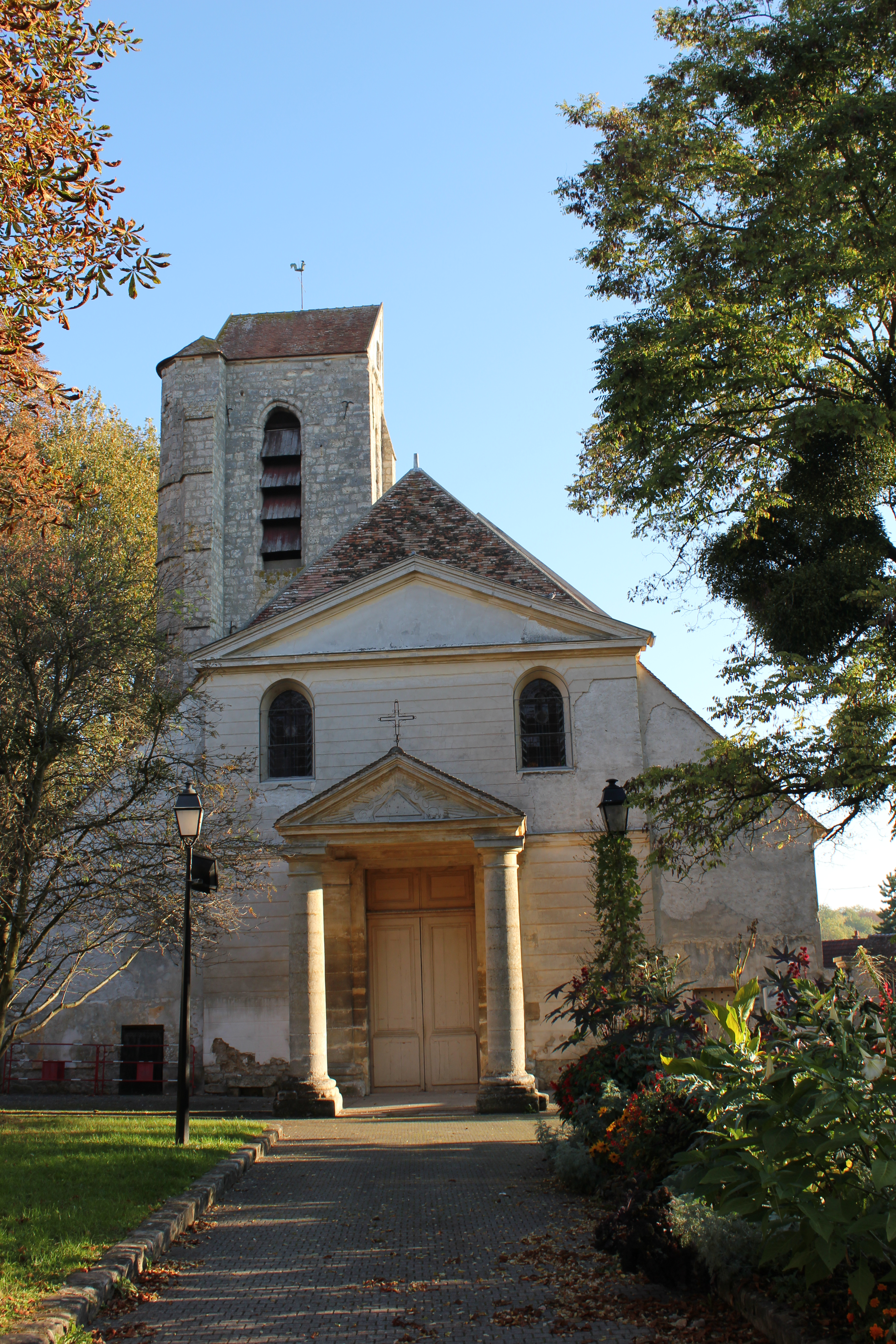 Façade de l’Église Saint-Louis de Servon.